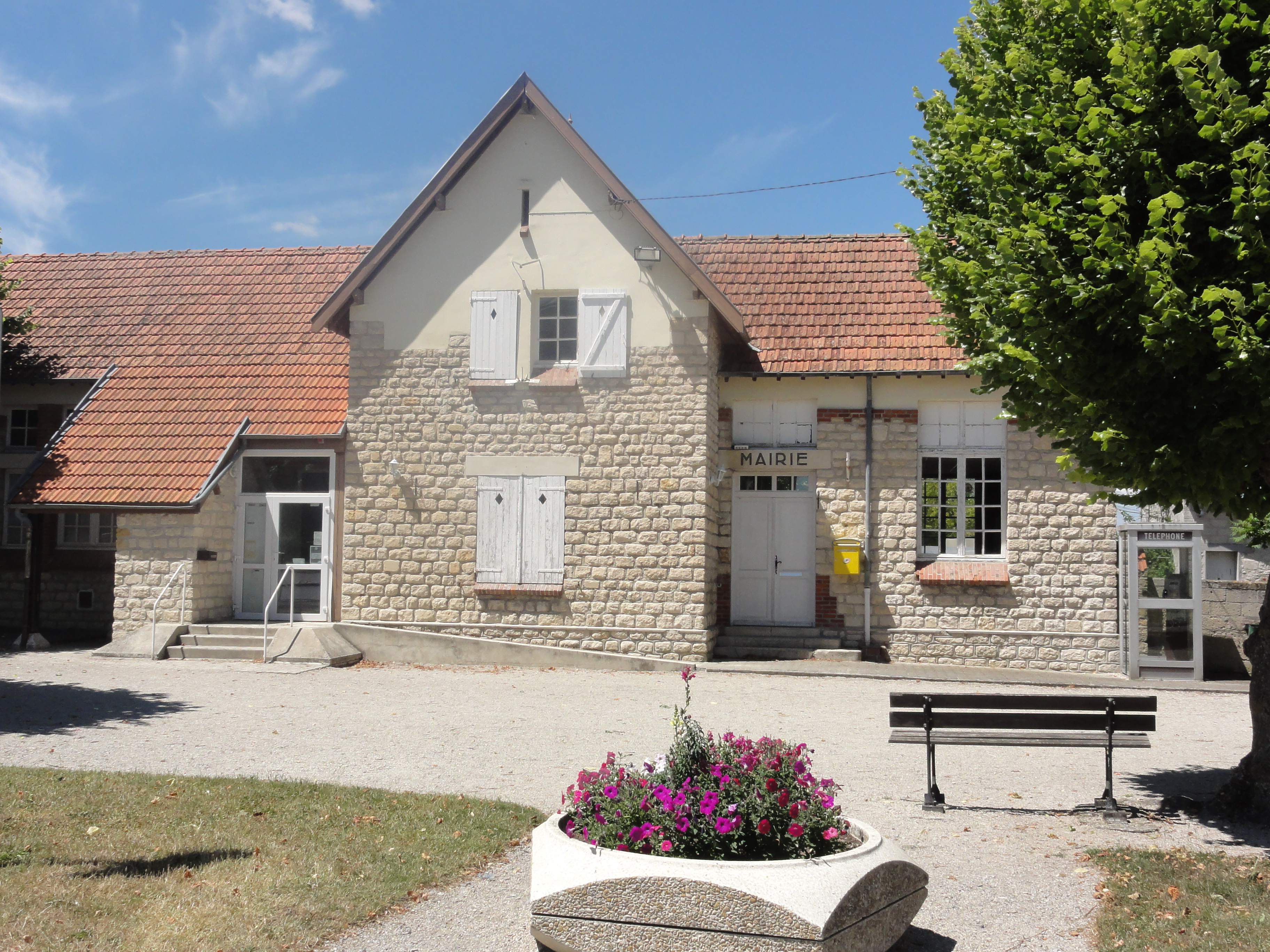 Variscourt (Aisne) mairie